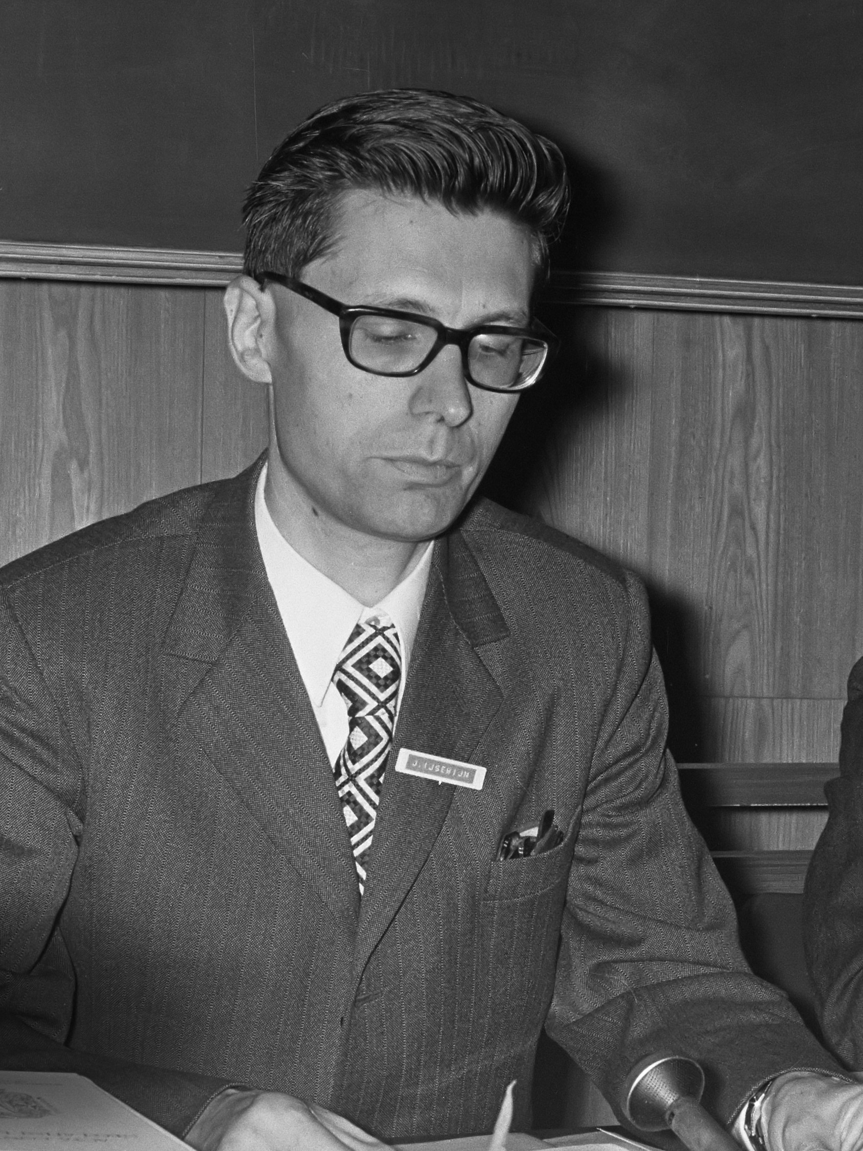 Congres van Neo-Latijnse studies geopend door Wethouder Van der Velde , prof. J. IJsewijn 20 augustus 1973